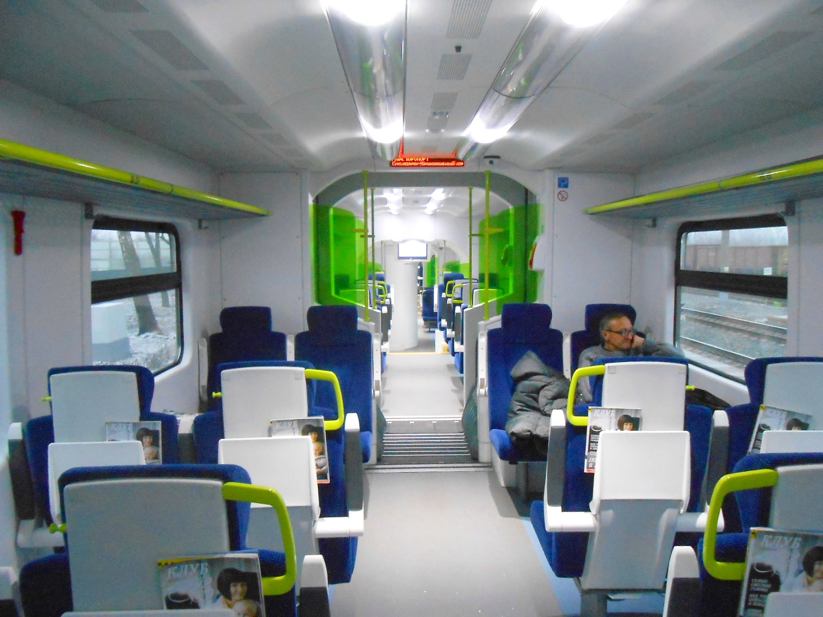 Салон дизель-поезда ДП3-001 (PESA 730M)